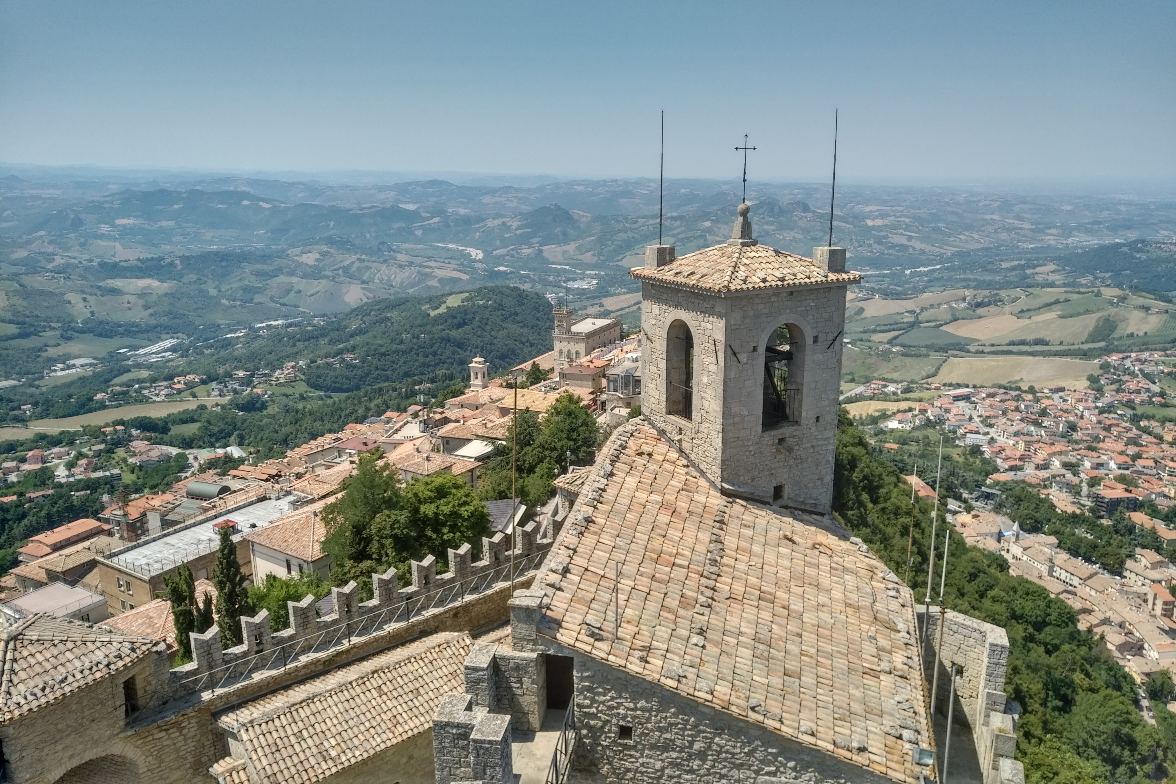 Überblick über Città di San Marino